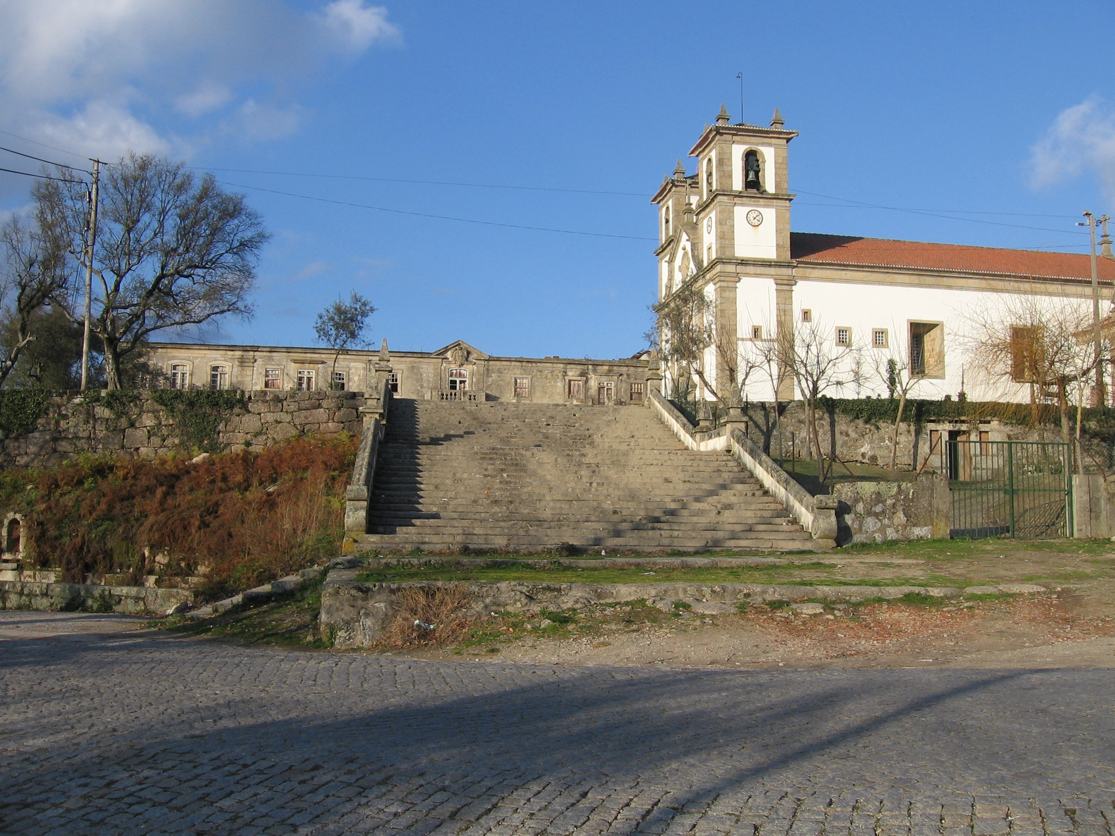 Mosteiro de Bustelo This file was uploaded for Wiki Loves Monuments in Portugal with the unique identifier 73224.